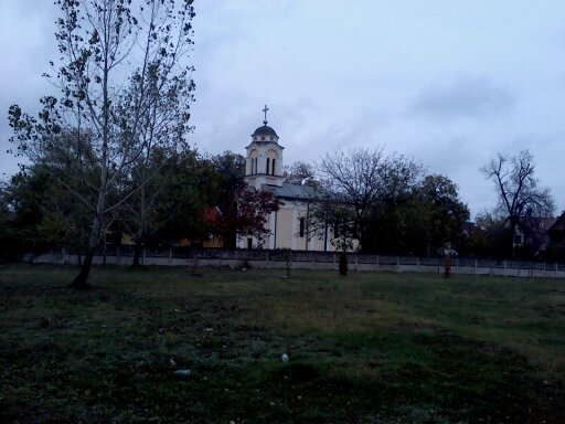 Crkva Rodjenja Presvete Bogorodice u Batočini sagrađena u 19. veku